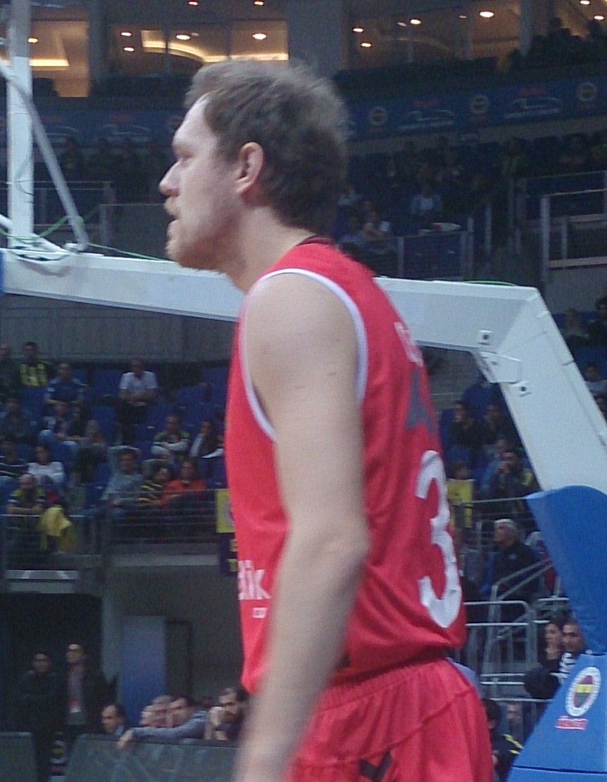 Ogün Sevinç